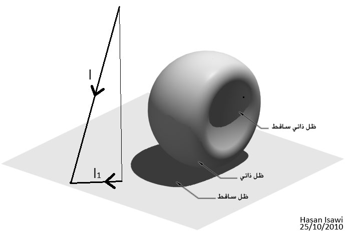 Teoria delle ombre: ombra propria, autoportata, portata